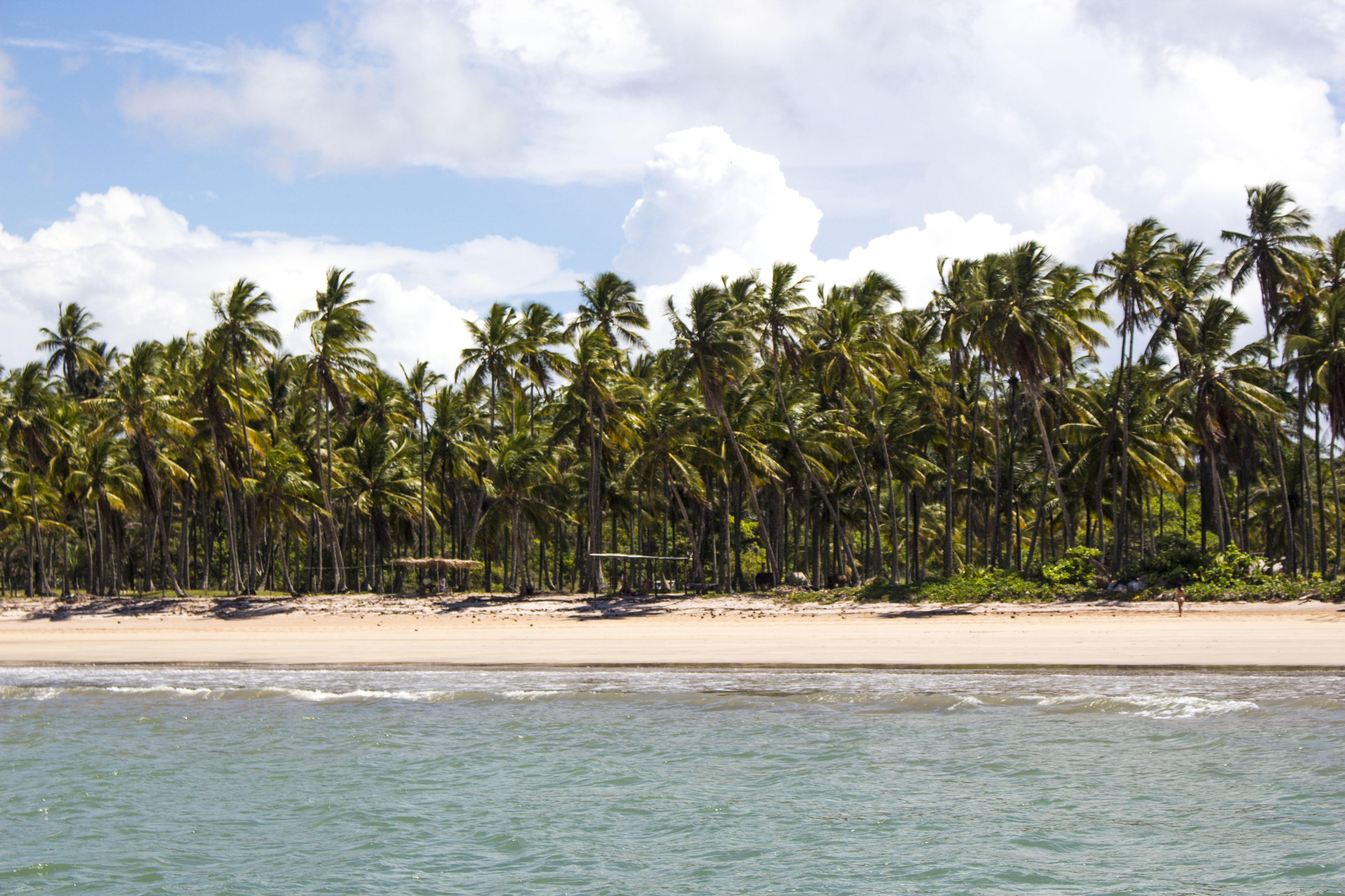 Foto tirada desde um barco, retrata os coqueirais da região de Pratigi, em Morro de São Paulo, Bahia.